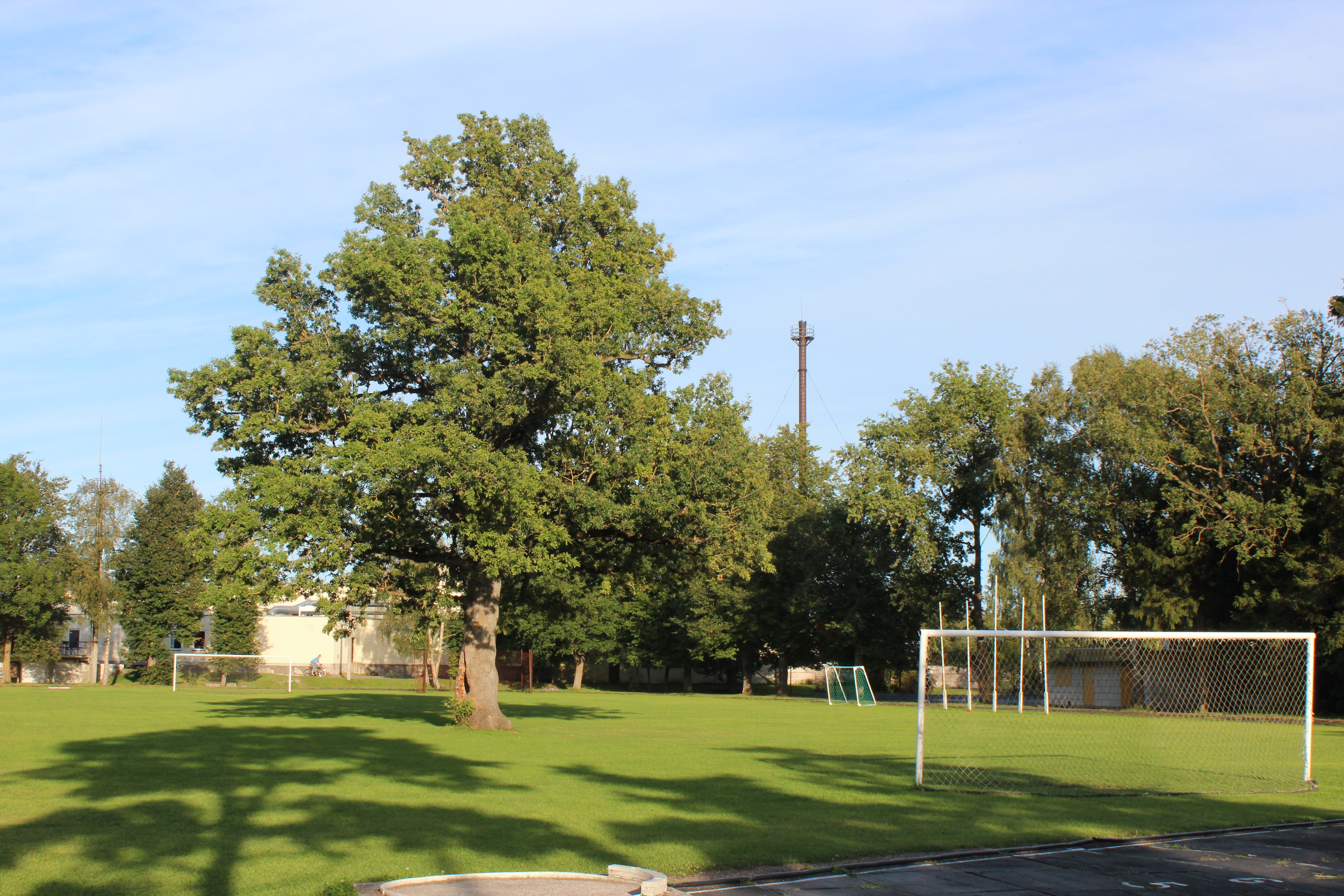 Orissaare staadion